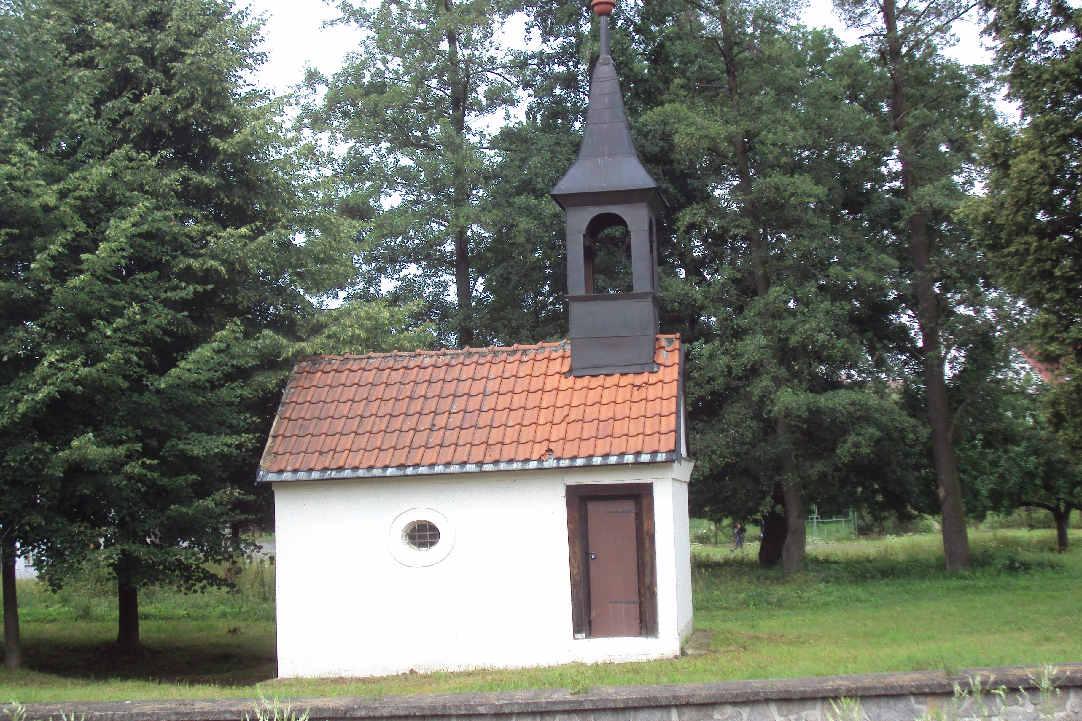 Kaple sv.Anny z Nábřežní ulice